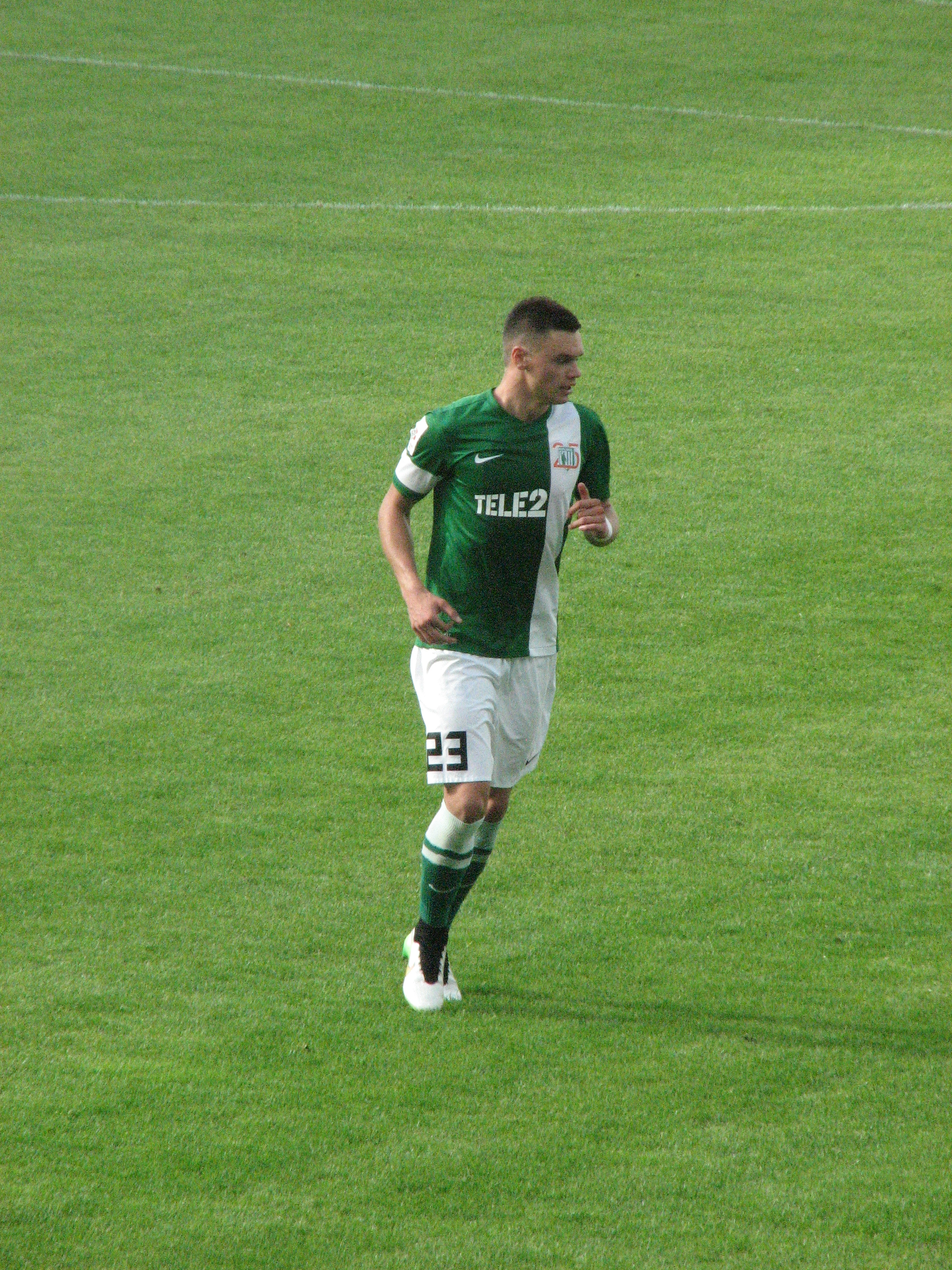 German Šlein mängimas JK Nõmme Kalju vastu